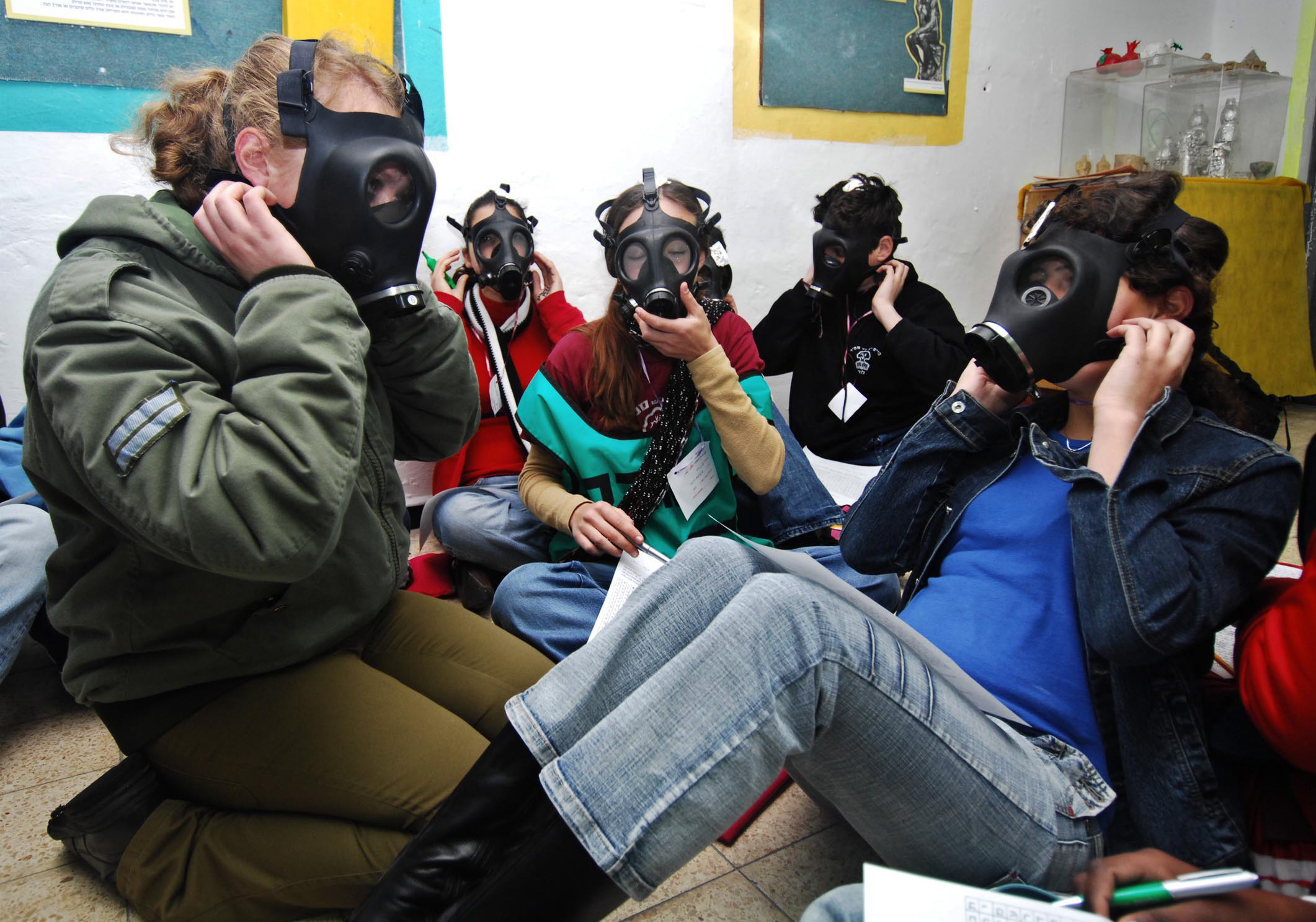 March 15, 2007. Every year, a nationwide home front protection drill is conducted in schools across Israel. The drill is a combined effort of the Home Front Command, the Ministry of Education, Magen David Adom and the Fire Department. The drill tests the preparedness of education institutions for emergency events, especially their ability to cope with rocket fire towards Israel. Pictured: A soldier practices putting on gas masks with students and their teacher. מדי שנה מתקיים תרגיל כלל-ארצי של פיקוד העורף בבתי ספר ברחבי הארץ: מאמץ משולב של פיקוד העורף, משרד החינוך, מגן דוד אדום ומכבי האש. התרגיל בוחן את המוכנות של מוסדות החינוך במקרי חירום, במיוחד ביכולותיהם להתמודד עם ירי רקטות אל עבר ישראל.בתמונה: חיילת מתרגלת חבישת מסכת אב"כ ביחד עם התלמידים ומורתיהם.